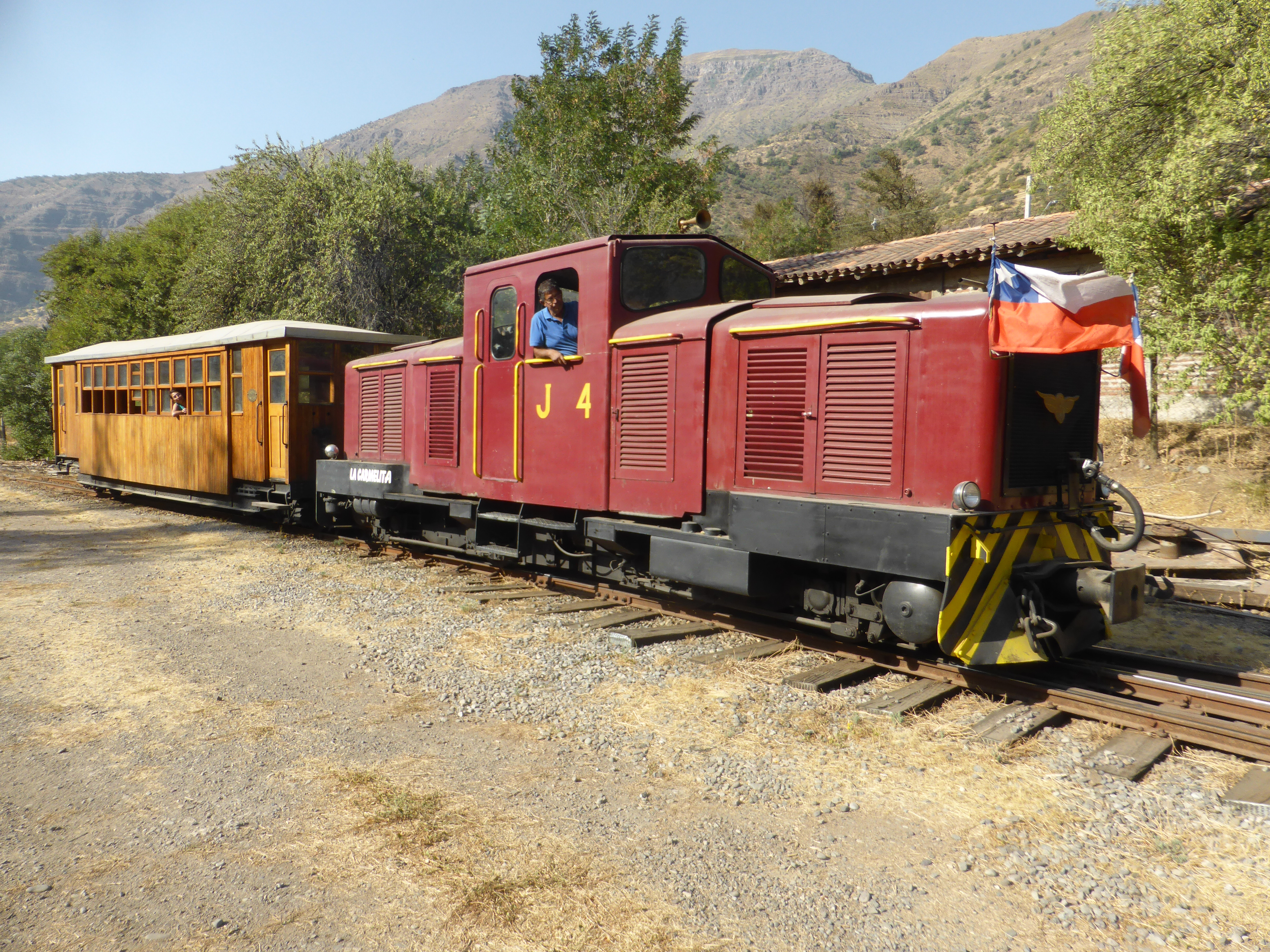 Estación El Melocotón. "Proyecto Ave Fénix", de recuperación del Tren Patrimonial del Cajón del Maipo, antiguo Tren Militar (F.C. Militar), de trocha o ancho de vía de 60 centímetros. Ferrocarril Puente Alto - El Volcán.